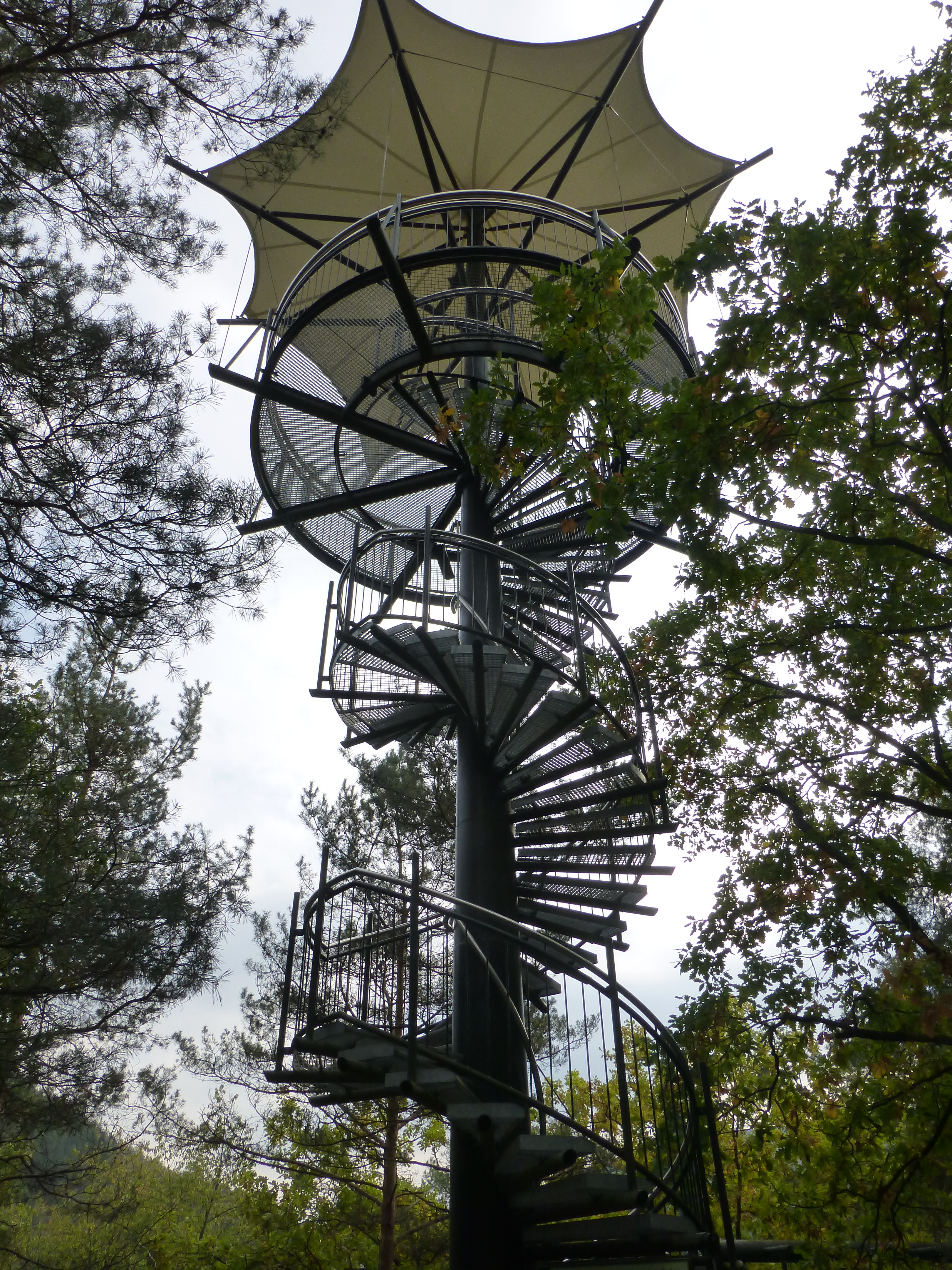 Baumwipfelpfad Biosphärenhaus, Adlerhorst (Nahaufnahme)